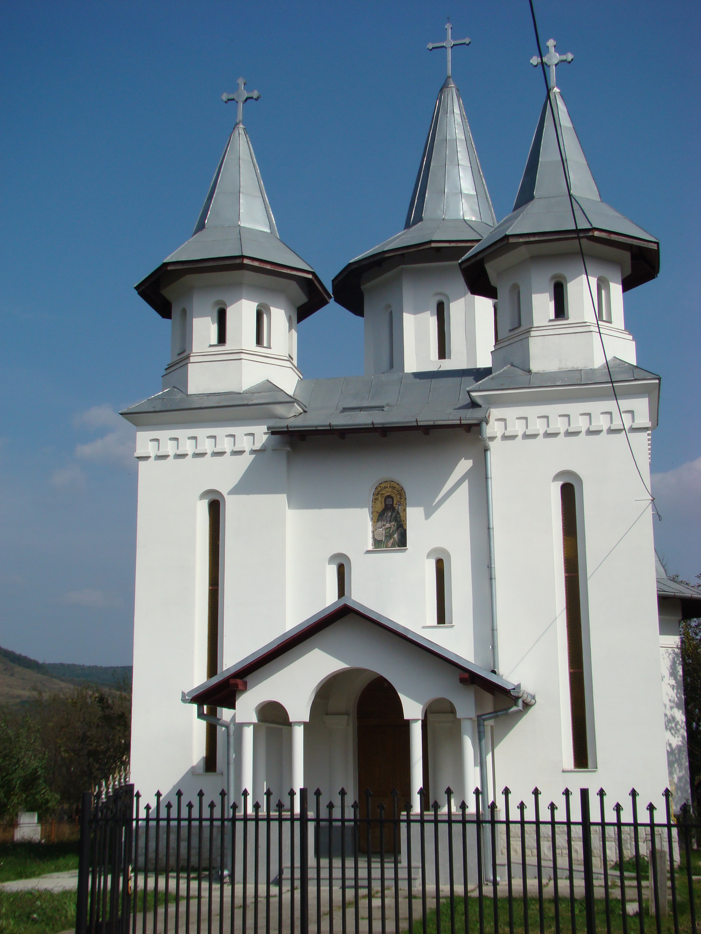 Biserica ortodoxă din Mintia, județul Hunedoara